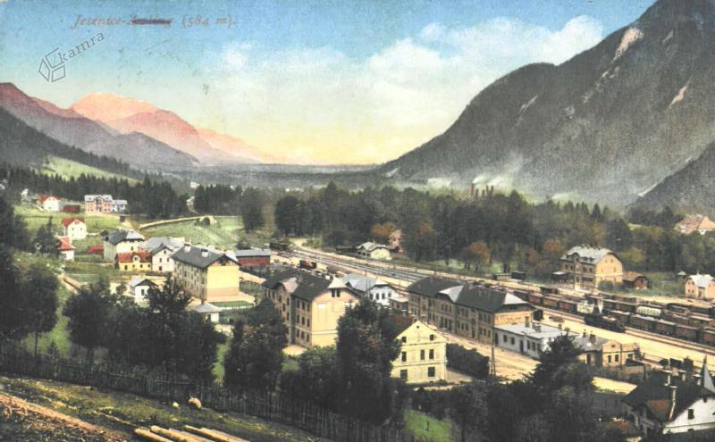 Razglednica Jesenic.